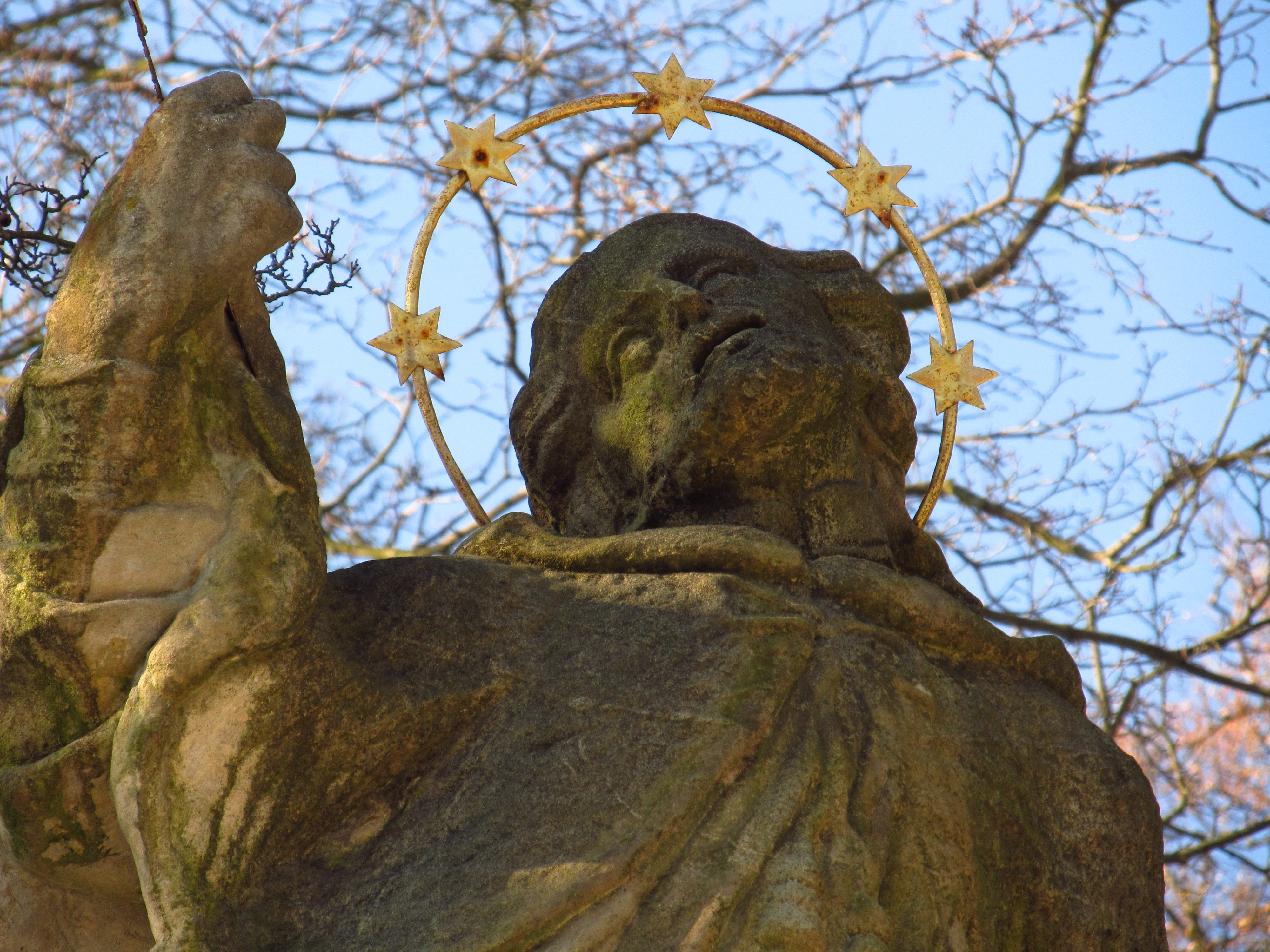 Socha sv. Jana Nepomuckého u kostela (fary), Hodkovice nad Mohelkou